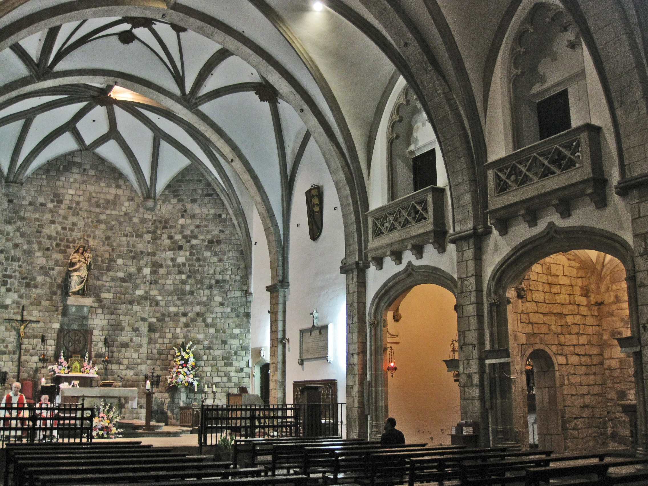 Antiga capella del Palau Reial Menor, actualment de la Mare de Déu de la Victòria. Construïda originàriament al segle XIII, fou reformada entre 1542 i 1547 i restaurada per Elies Rogent el 1868. Vista de la nau i les capelles laterals.